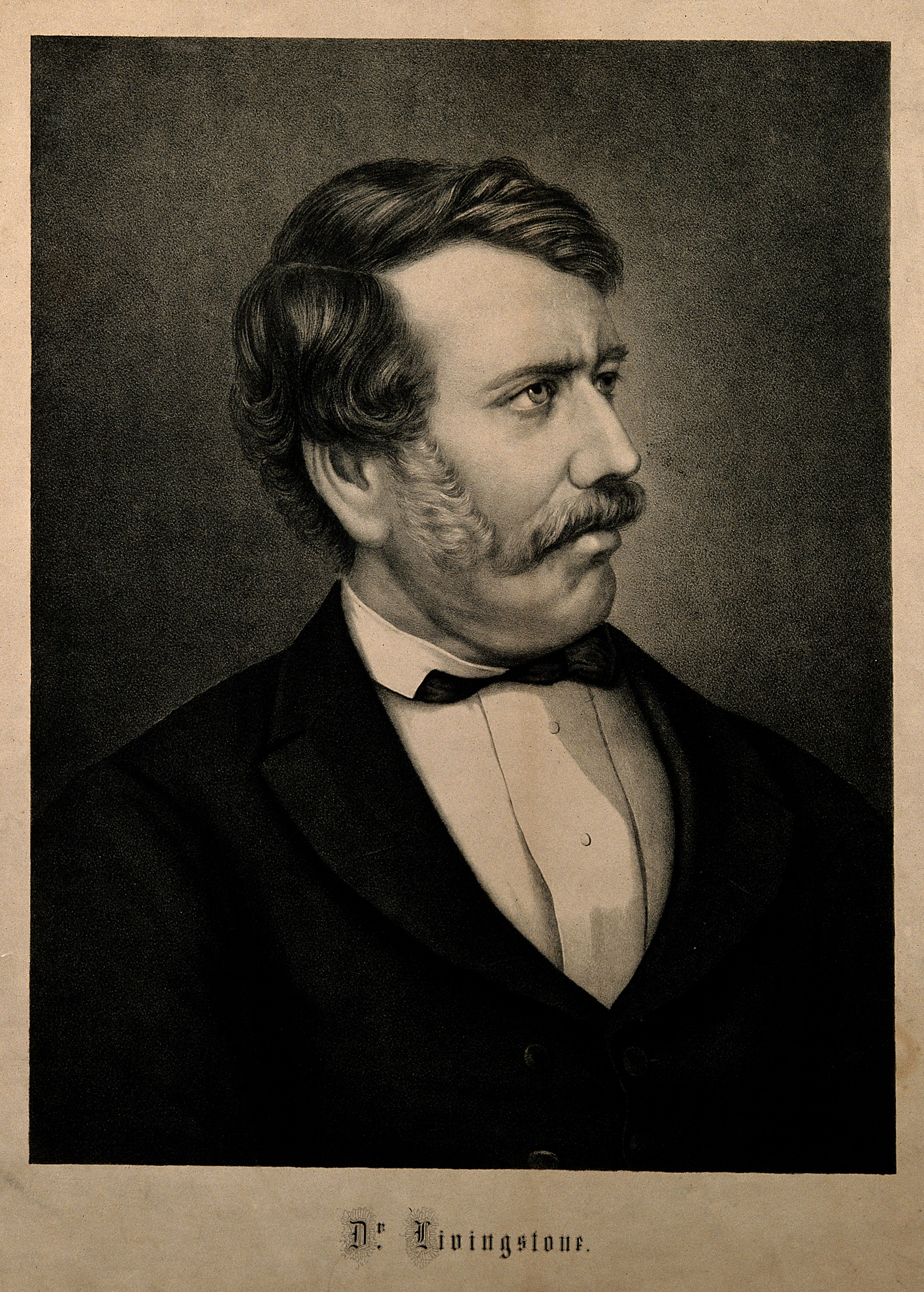 Topic-LCSH: Explorers. Missionaries. Genre/Technique: Portrait prints. Lithographs. Subject name: Livingstone, David, 1813-1873.